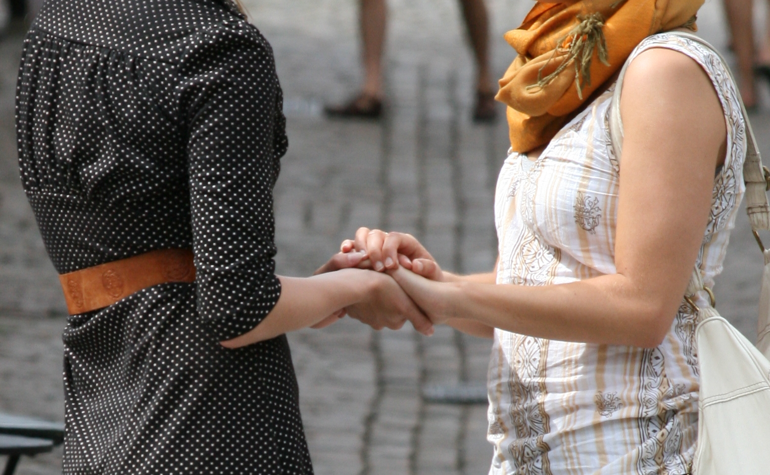 Friendship, Göteborg, Sweden